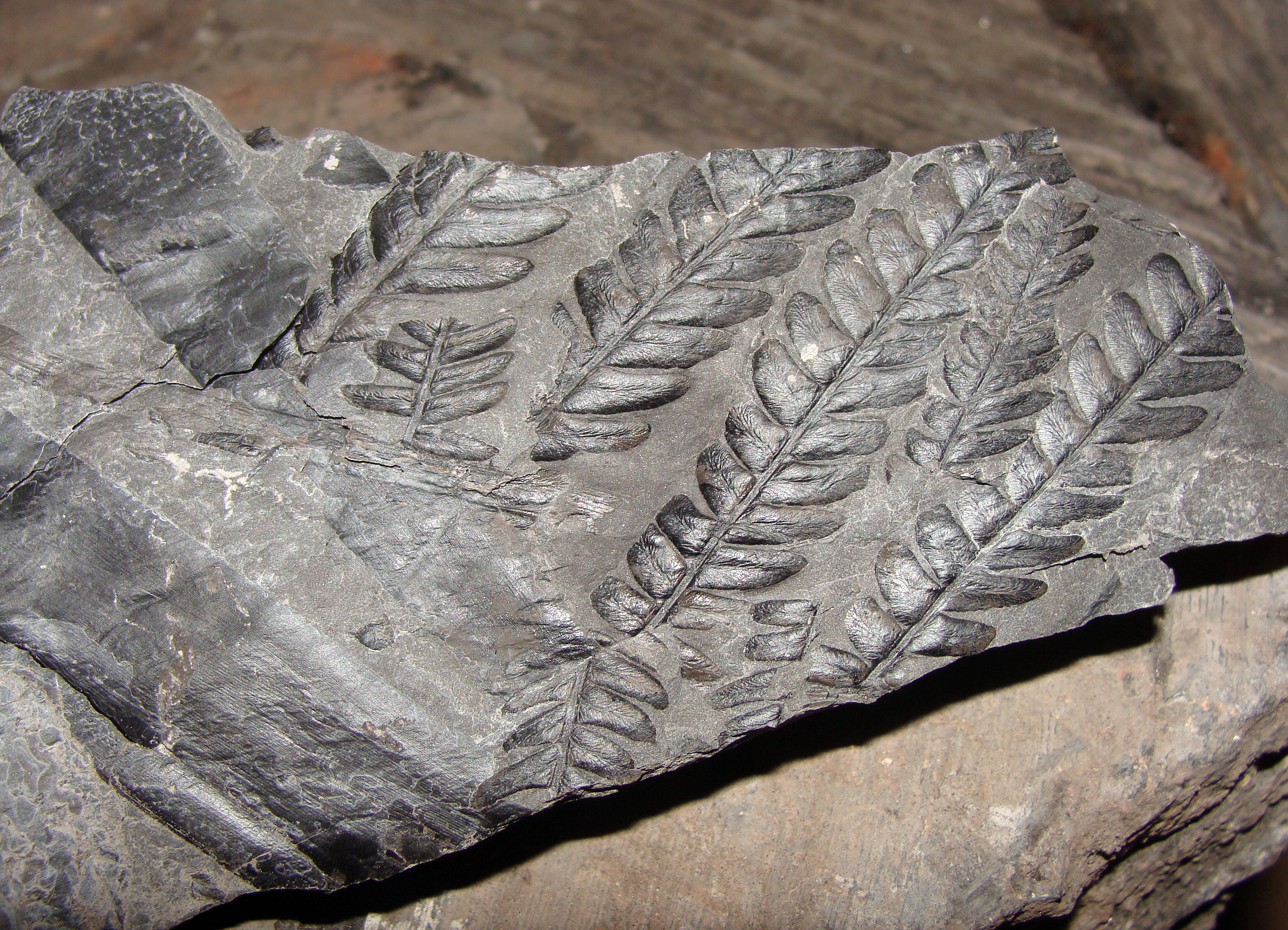 Carrière du Barrois, schistes carbonifères (terril de Sainte-Fontaine).